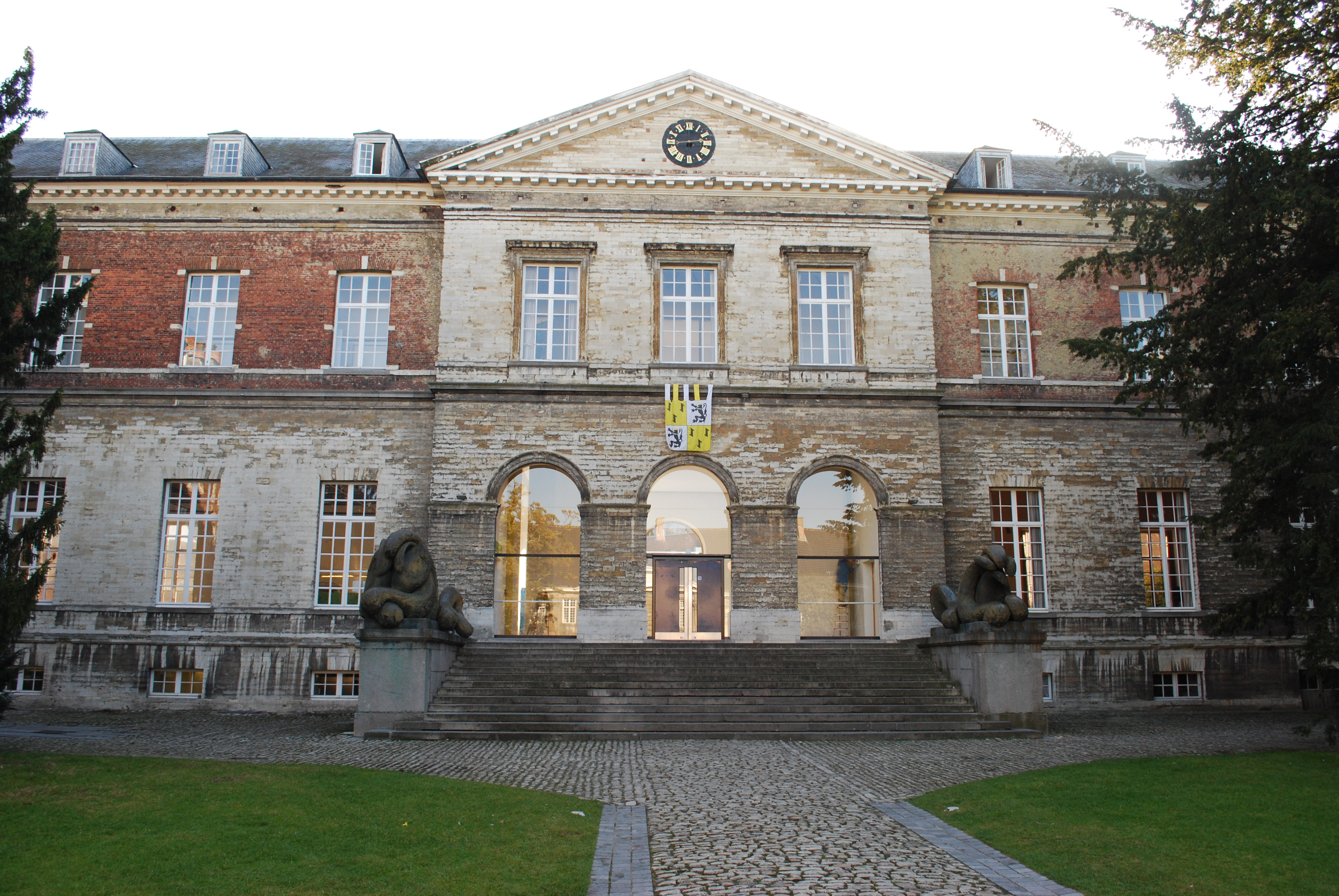 Leuven : Collège du Pape.